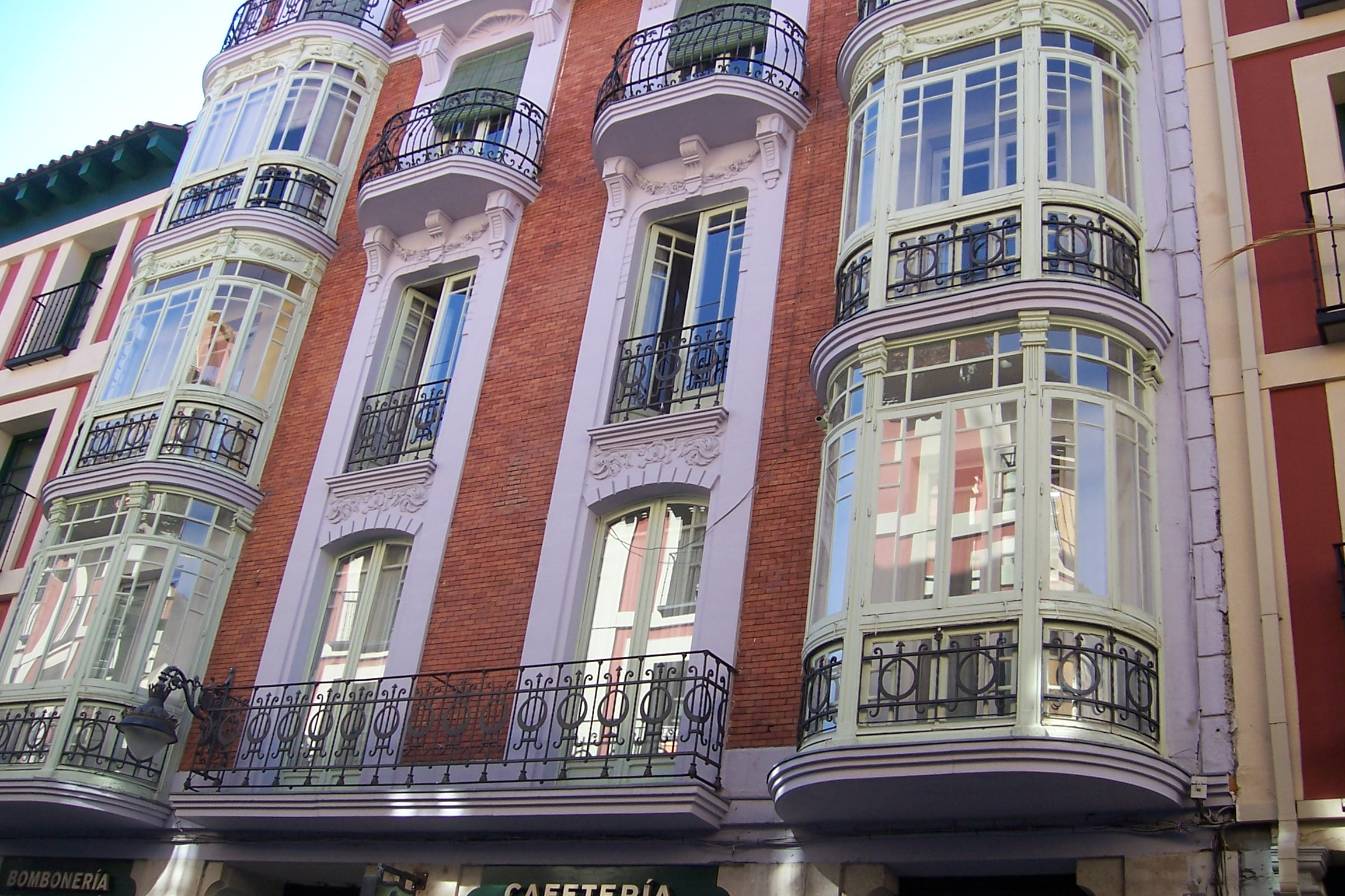 El conjunto histórico de la Calle de la Platería, junto con la Plaza del Ochavo forma parte del conjunto mercantil de la antigua Plaza del Mercado de Valladolid y el barrio de artesanos que tuvo que ser reedificado tras el incendio de 1561. En la imagen una casa de la calle.